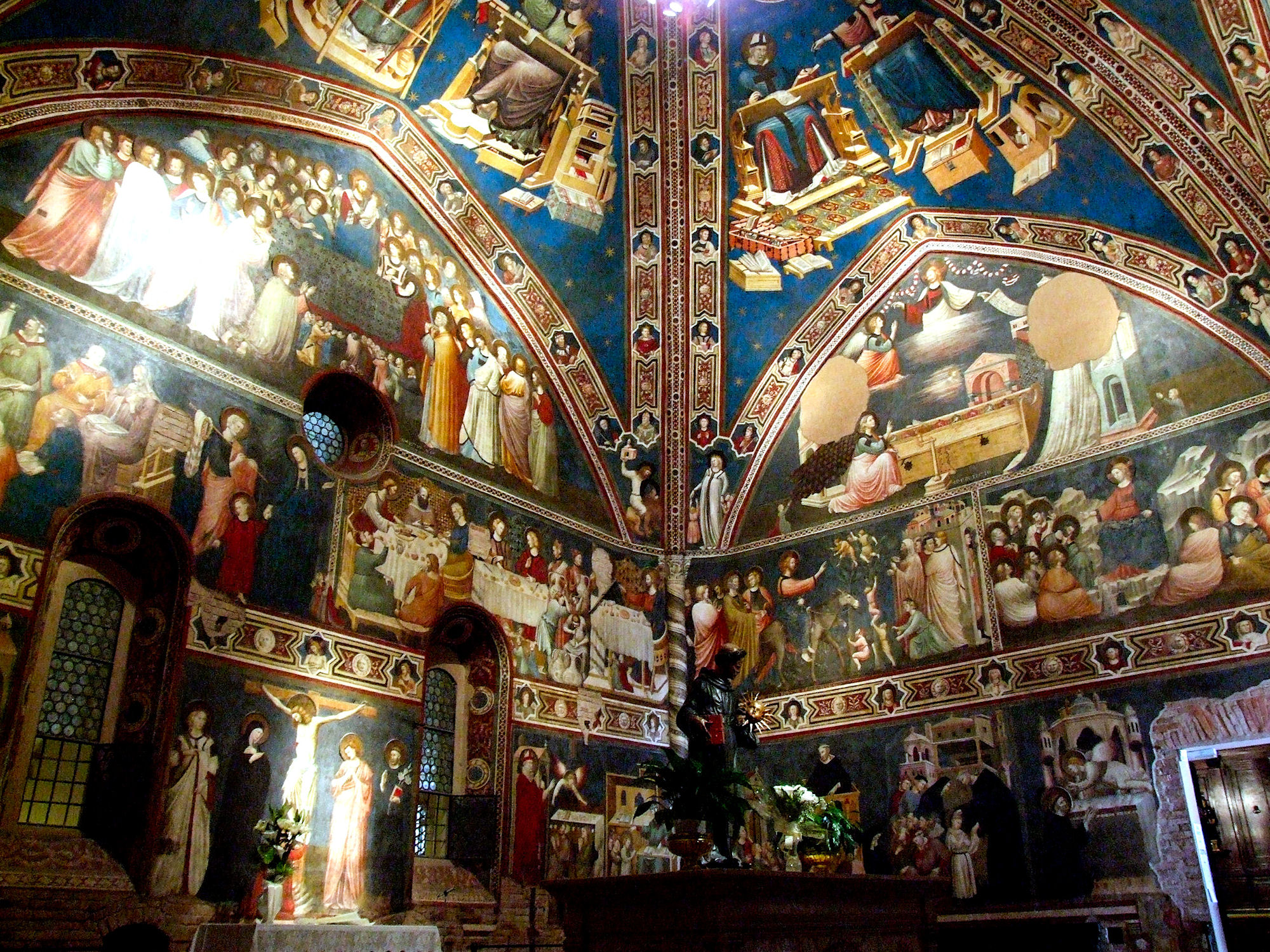 Cappellone di San Nicola, Basilica di San Nicola da Tolentino, Tolentino, Italy